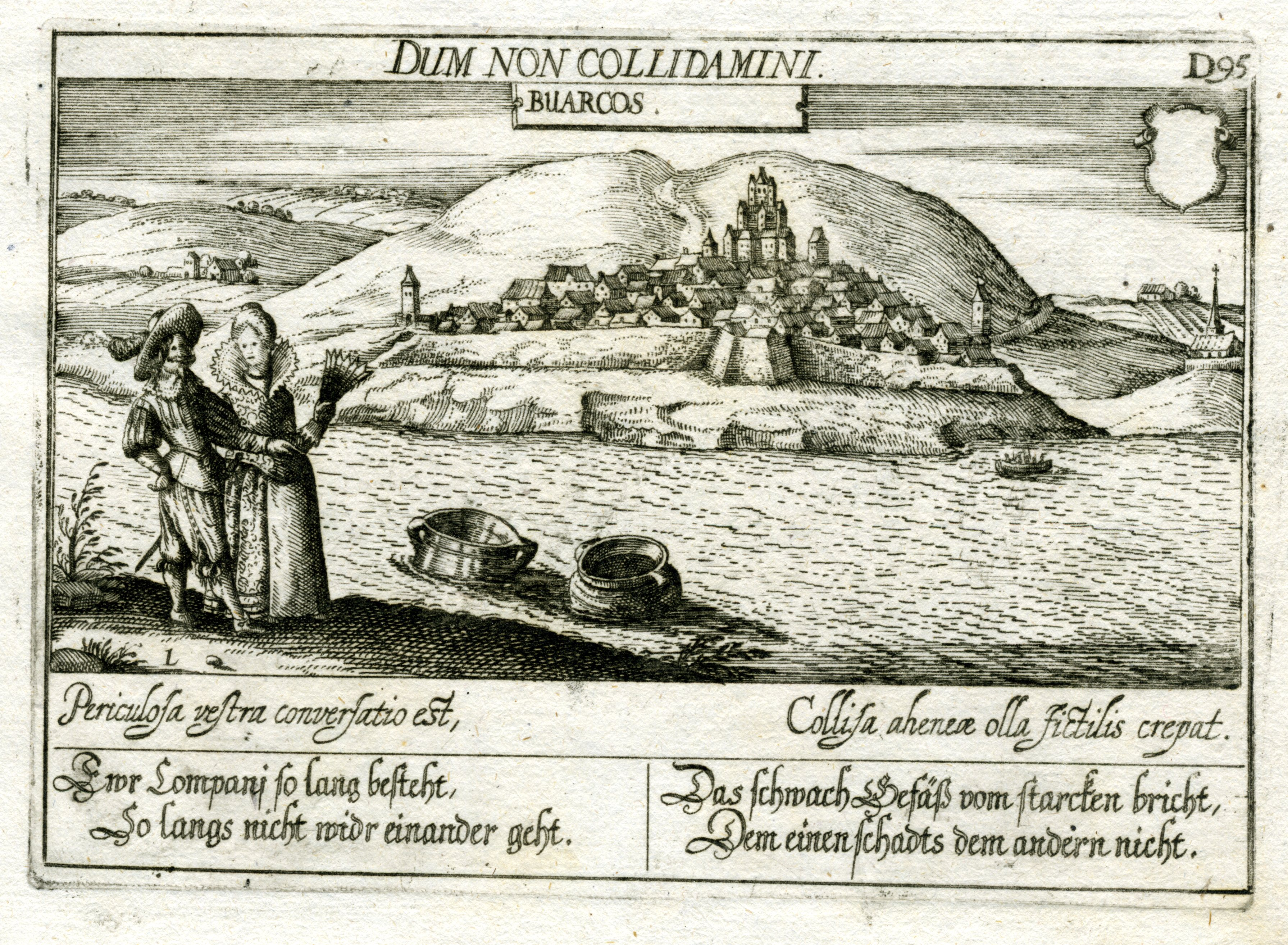 gravure de Meisner